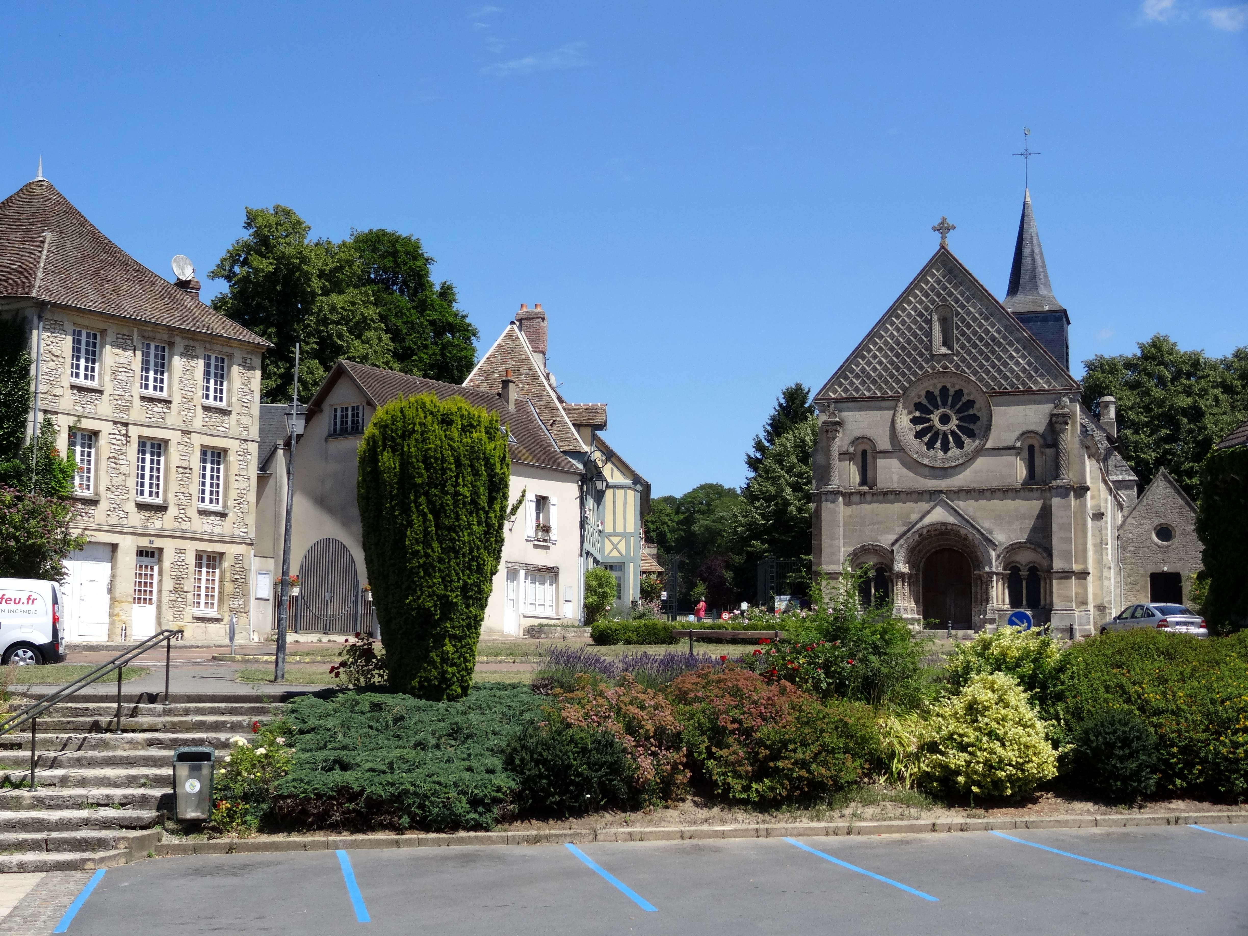 Place de l'Église.